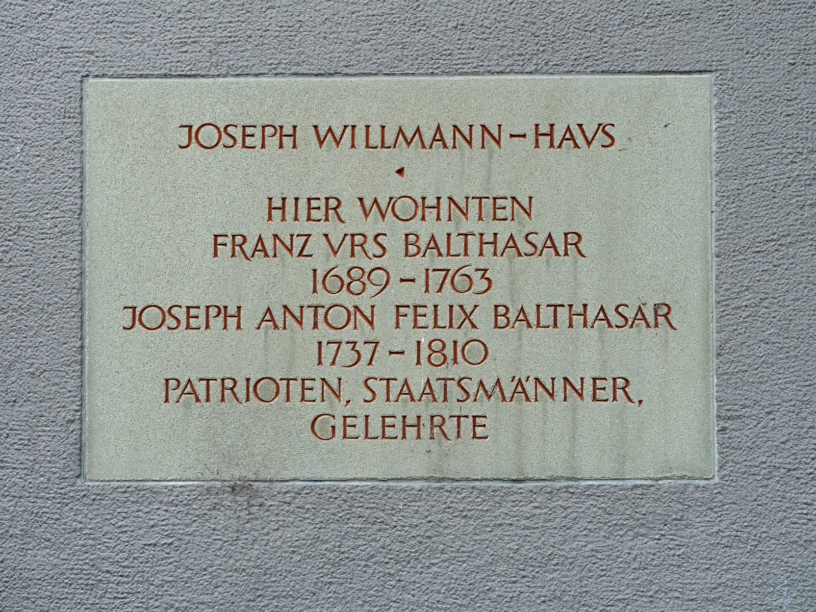 Joseph Willmann Haus. Hier wohnten Franz Urs Bathasar (1689–1763) und Joseph Anton Felix Balthasar (1737–1810). Kapellplatz 7, Luzern, Schweiz